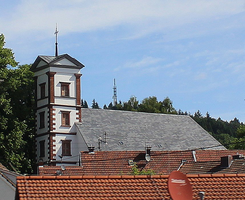 Die evangelische Kirche in Niederlinxweiler, Stadt St. Wendel, Saarland.